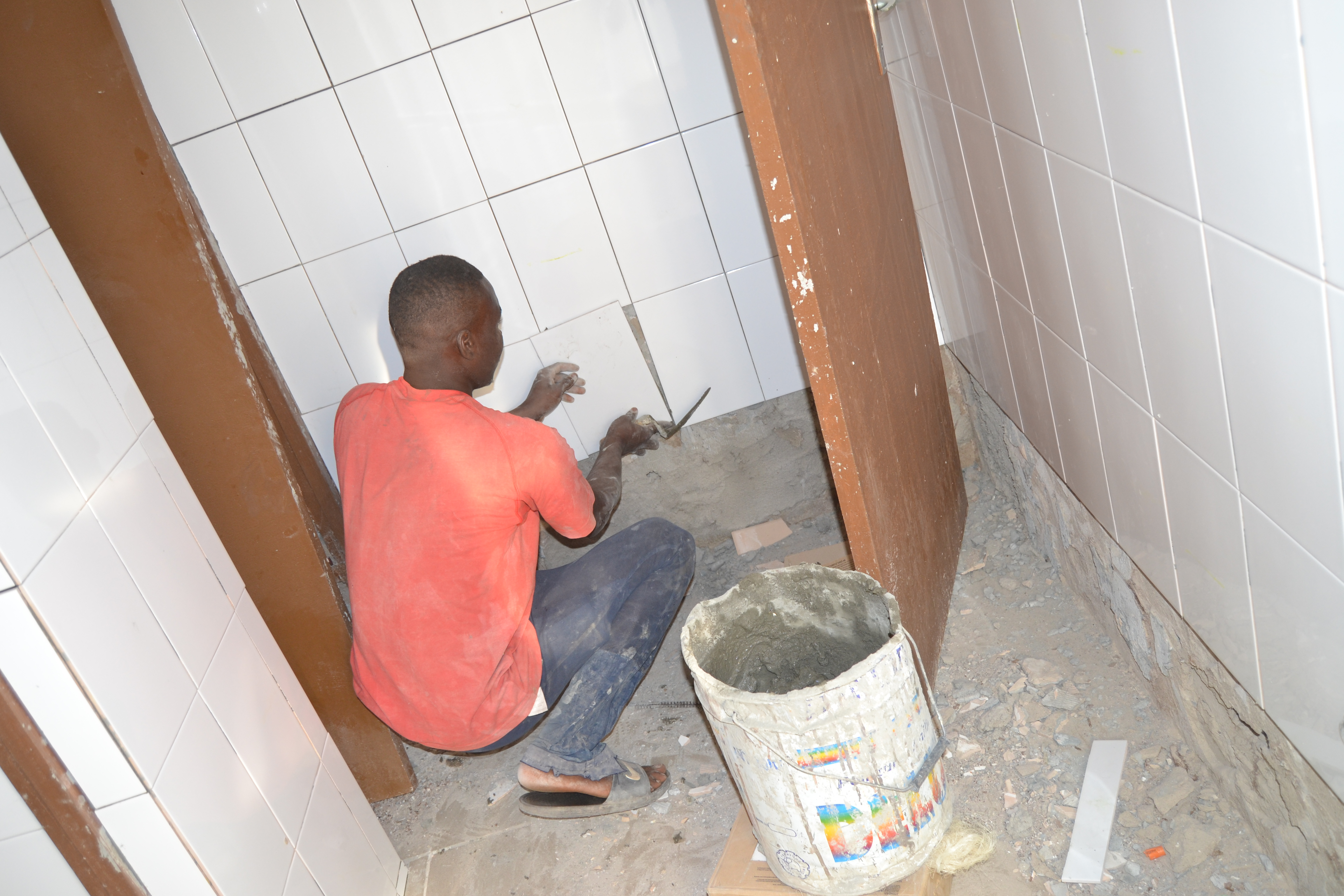 Un carreleur en pleine journée de travail au lycée professionnel de Ferké, une ville située au Nord de la Côte d'Ivoire. La ville est à environ 600 km d'Abidjan, la capitale économique ivoirienne. This is an image of "African people at work" from Ivory Coast